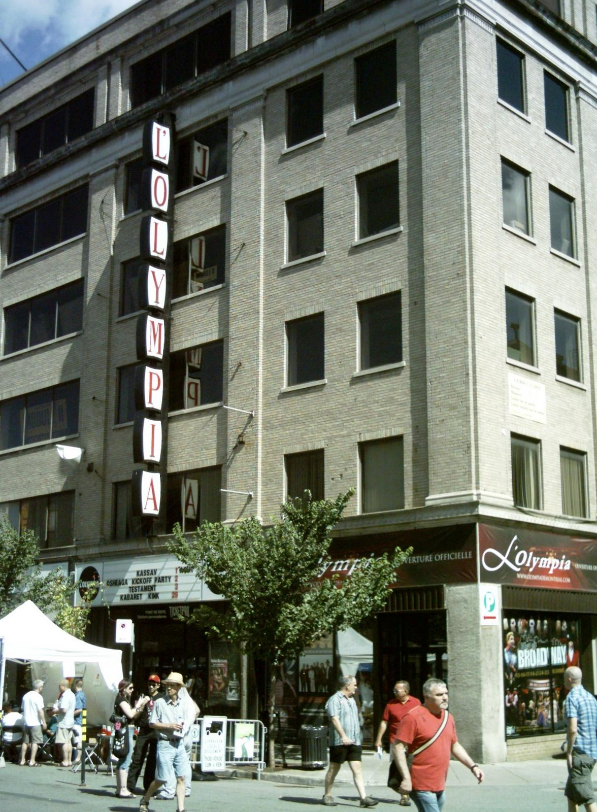 L'Olympia de Montréal situé au 1004 rue Sainte-Catherine Est